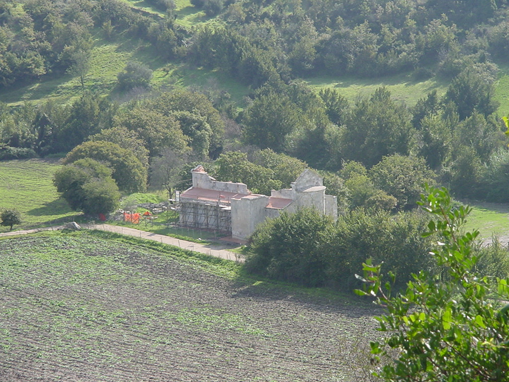 La chiesa di san Nicola di Silanos nell'omonima valle. Sedini - Italia